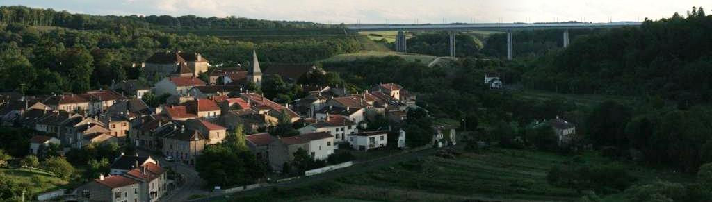 Panorama de Jaulny